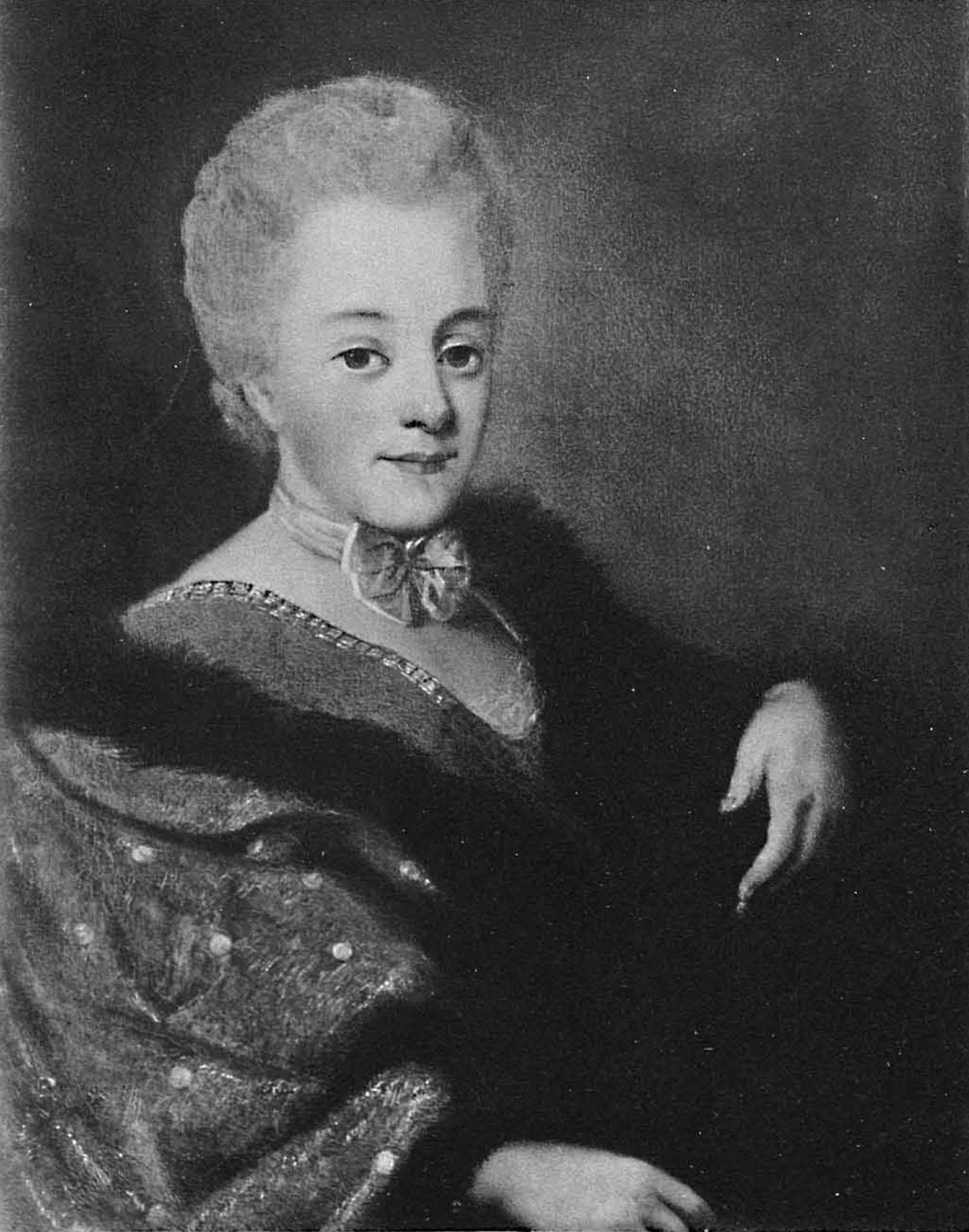 Екатерина Ивановна Разумовская, ур. Нарышкина (1729—1771), фрейлина, с 1746 года была замужем за Кириллом Григорьевичем Разумовским (1728-1803).